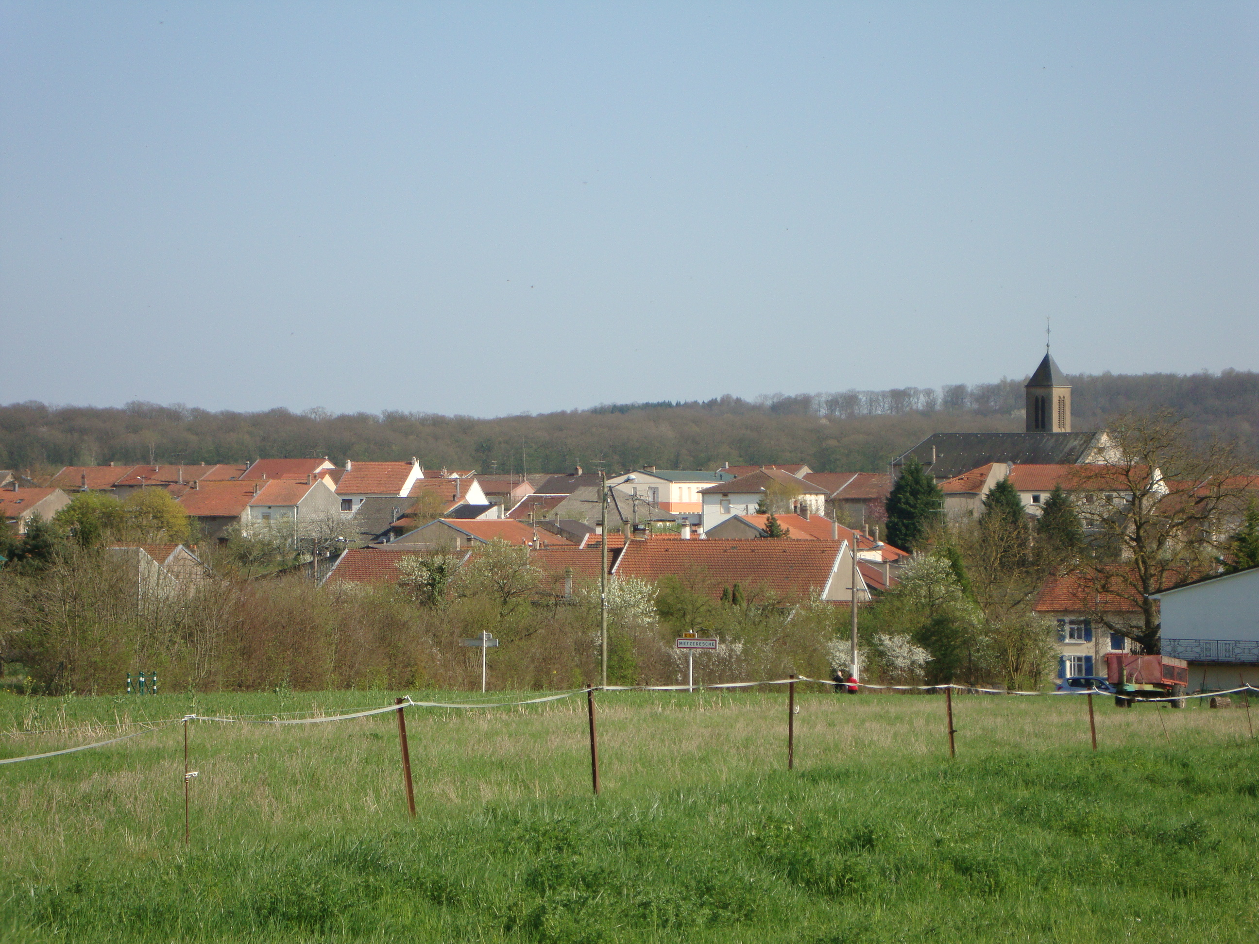 Metzeresche - Vue générale